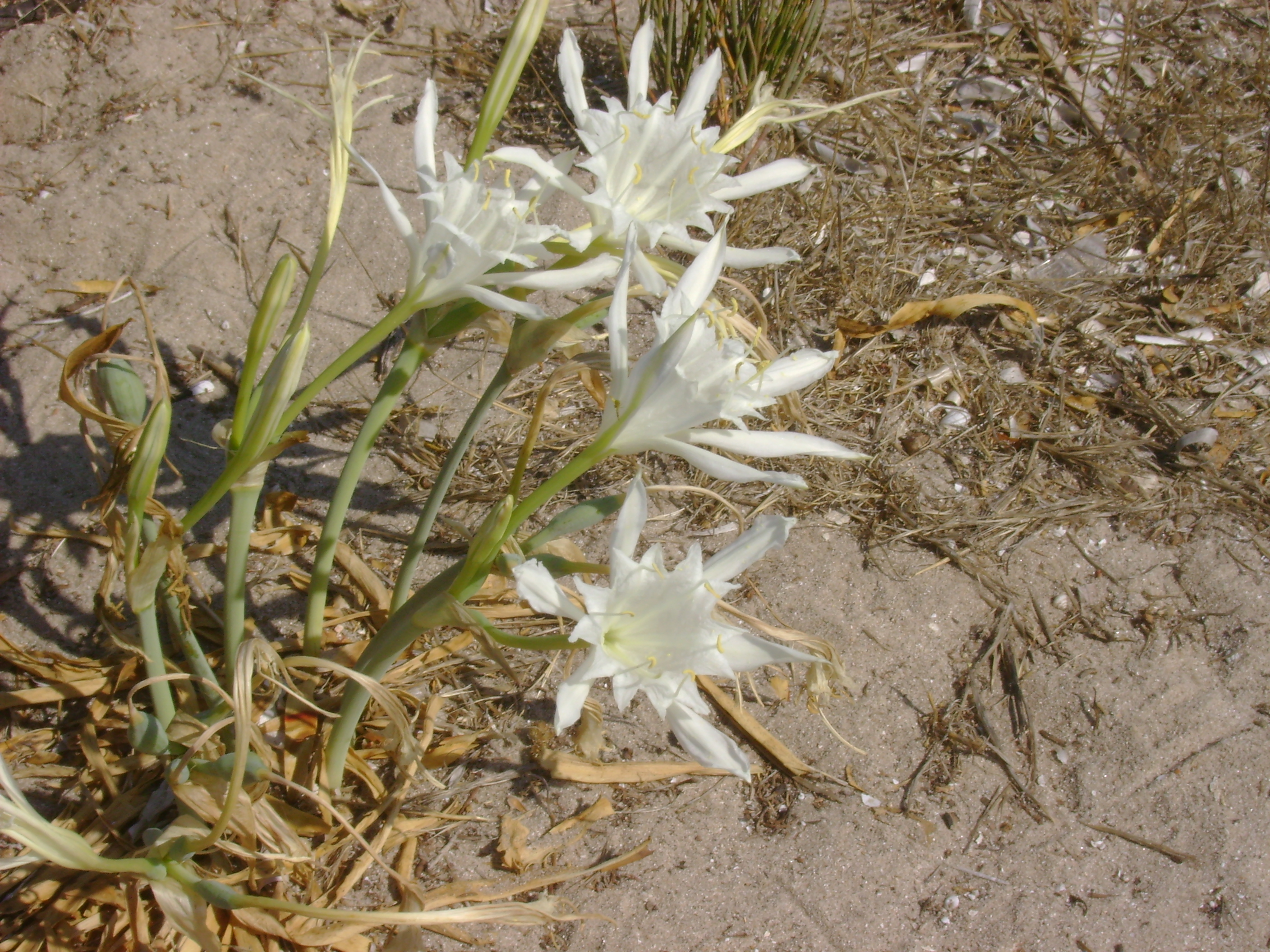 Pianta bulbosa che cresce spontaneamente sui litorali italiani.